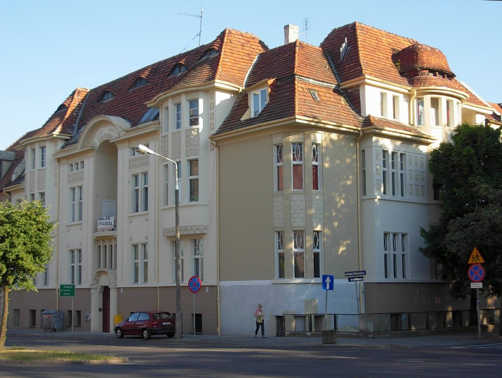 Aleja Adama Mickiewicza w Bydgoszczy